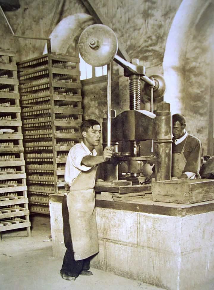 Taller prensa azulejos fábrica Nuestra Señora del Prado. Ruiz de Luna Talavera de la Reina (Toledo)